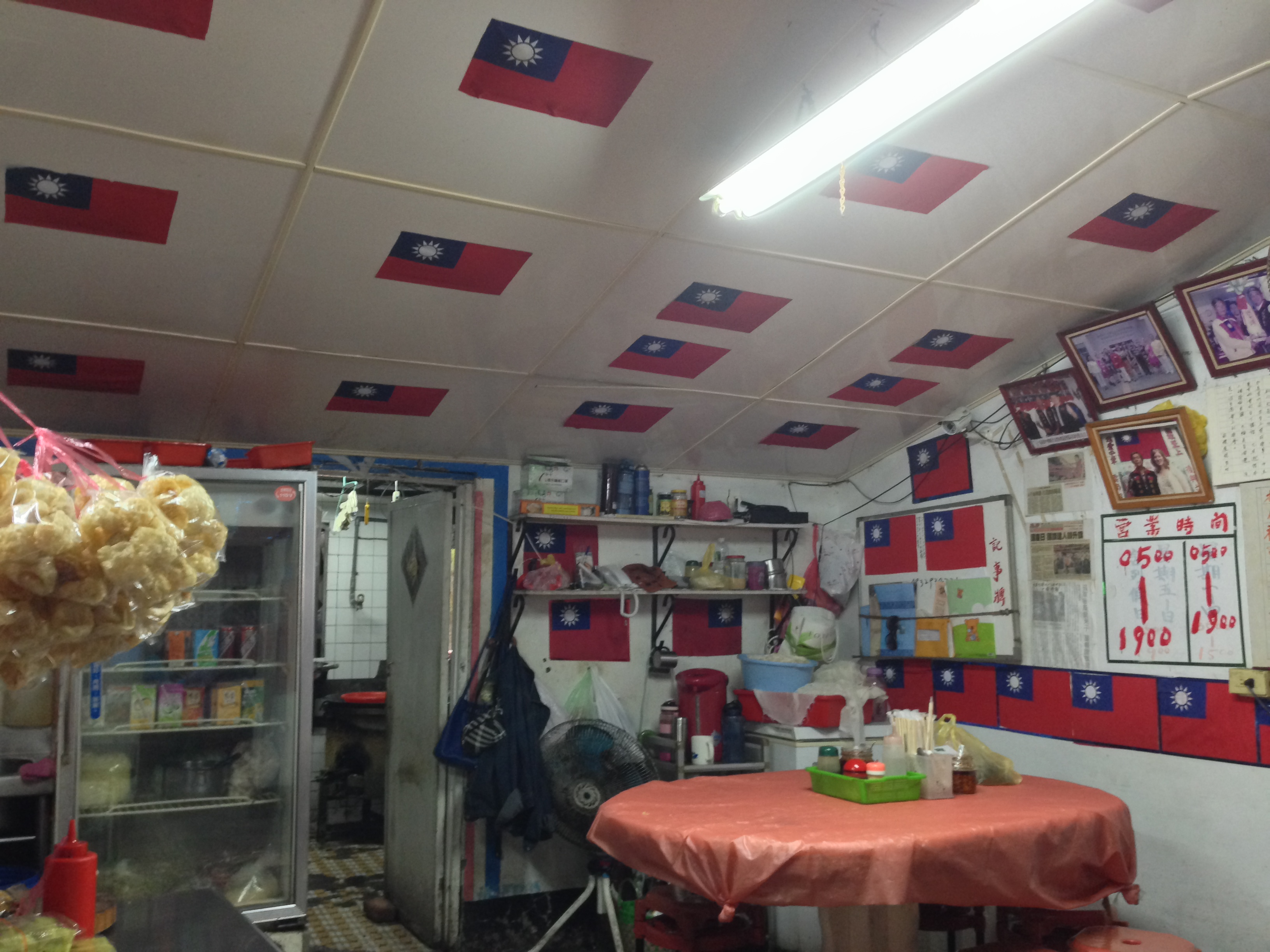 中文（台灣）: 國旗內屋一景